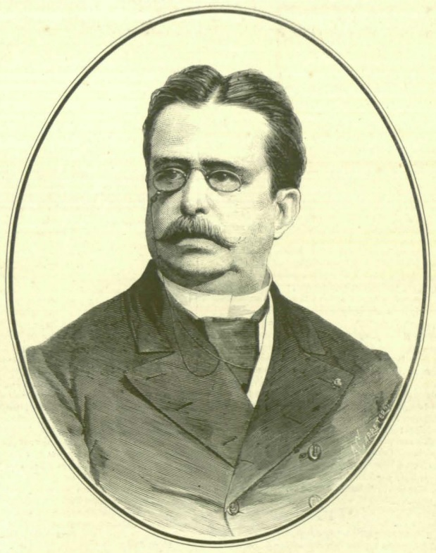 D. Rafael Rodríguez Arias, ministro de Marina.